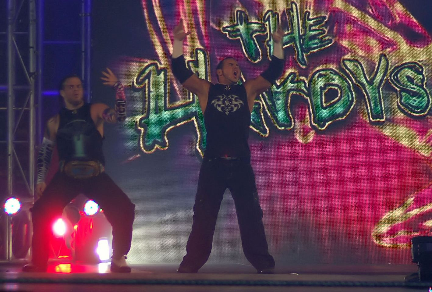 The Hardys